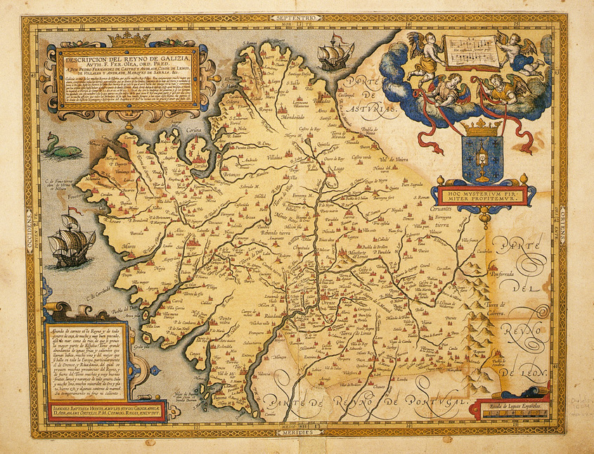 O mapa Descripcion del Reyno de Galizia de Fernando Ojea gravado contra o ano 1603 e publicado no atlas Theatrum Orbis Terrarum de Abraham Ortelius. DESCRIPCION DEL REYNO DE GALIZIA, Avth. F. Fer. oIea, ord. Pred. A Don Pedro Fernandez de Castro y Andrade, Conde de Lemos, de Villalva y Andrade, Marqves de Sarria. &c. Galizia es vno de los muchos Reynos de Eſpaña, que poßée nueſtro Rey Filipo. Era antiguamente mucho mayor que ahora, comprendia todas las tierras y prouinçias que ay dentro de los limites ſiguientes, de la mar del Norte y montaña de Iunto à Vizcaya, haſta las fuentes del gran Rio Duero, y de ay todo lo que el corre hasta dar consigo en la mar, y caminando por las orillas della haſta boluer al miſmo punto de dunde ſalimos. Marij Aretij dialog. de deſcript. Hiſp. apud Beroſum, et Viterb. in inquirid. et Florian. de Campo lib.3.c.40, et 42, et lib.4.c.3. Oy en dia con la mudança del gouierno, y de los tiempos, ha quedado con eſte nombre solo lo que parece en eſta tabla: de lo qual tiene V.Exª. vna gran parte, y aßí por ella como por la mucha afficion que todos los Principes de ſu caſa han tenido ſiempre a las cosas deſte Reyno, me parecio ſe le deuia de Iuſticia la ymagen y deſcripcion del. Supplicio à V.Exª. la reciua con la gracia y amor que ſuele. &c.